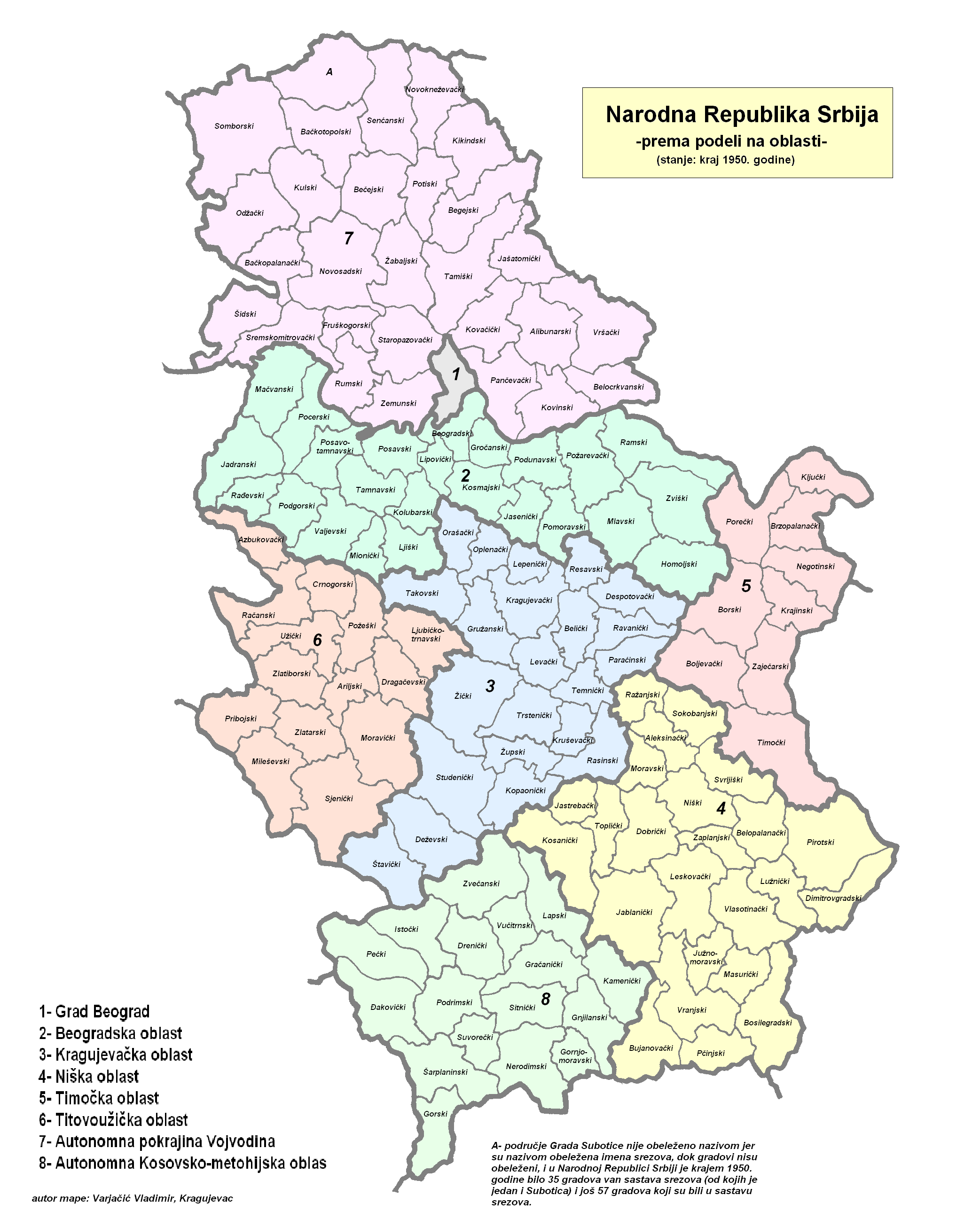 Подела Народне Републике Србије на области од 1949. до 1951. године